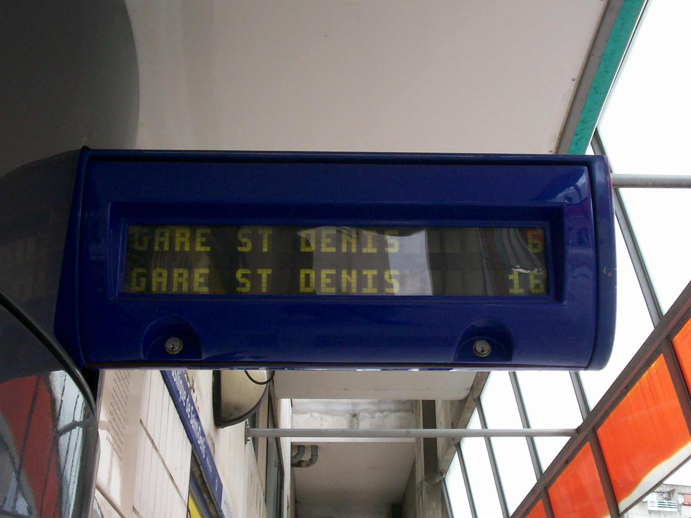 Borne SIEL